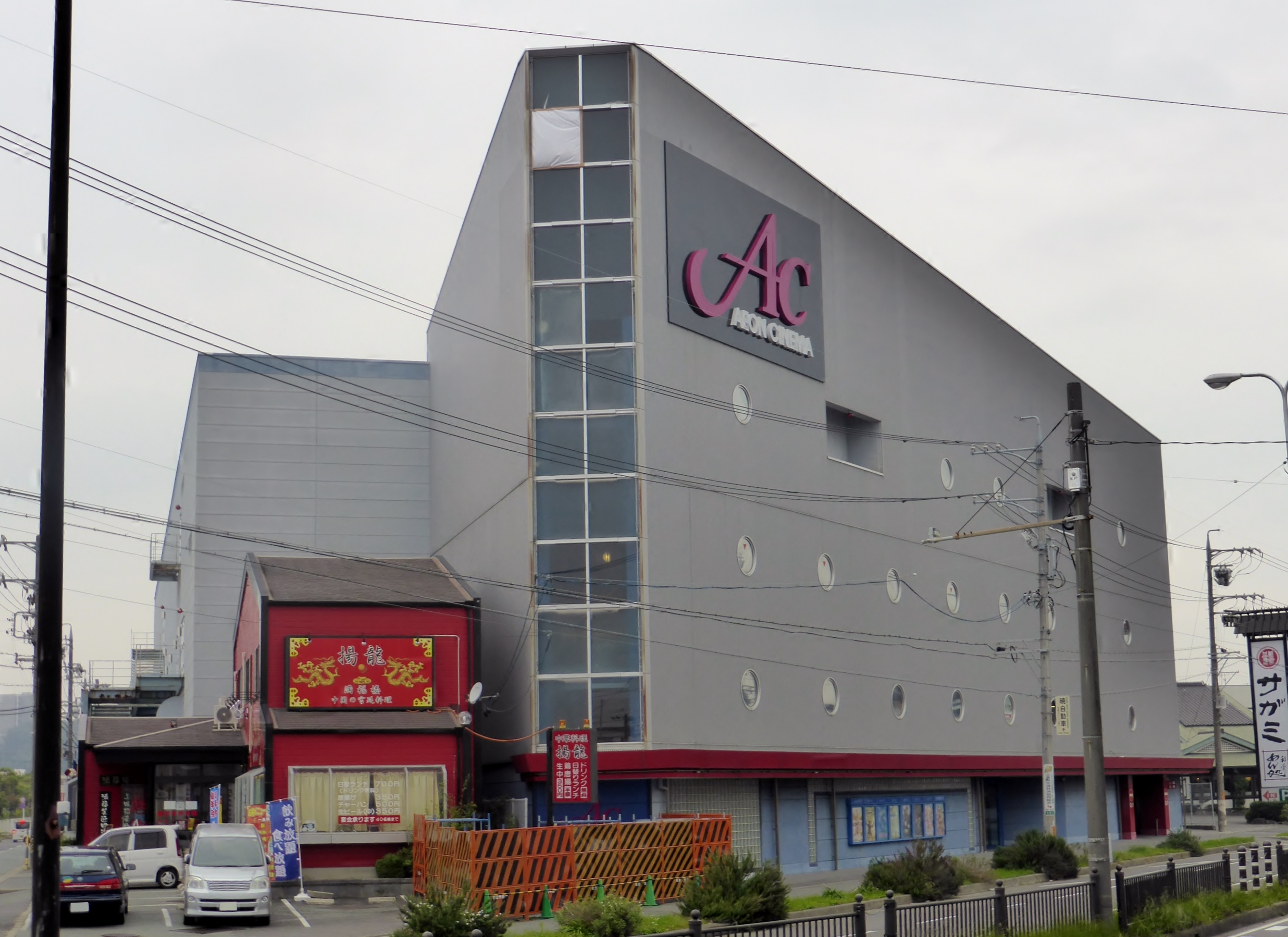 イオンシネマ津を撮影。